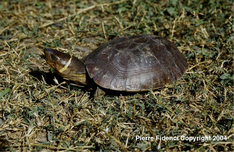 Heosemys leytensis